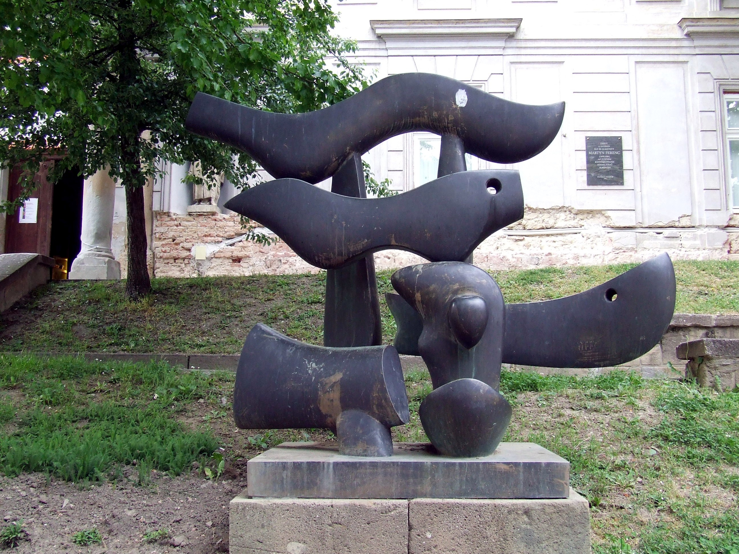 Martyn Ferenc Barbár emlék című alkotása Pécsen